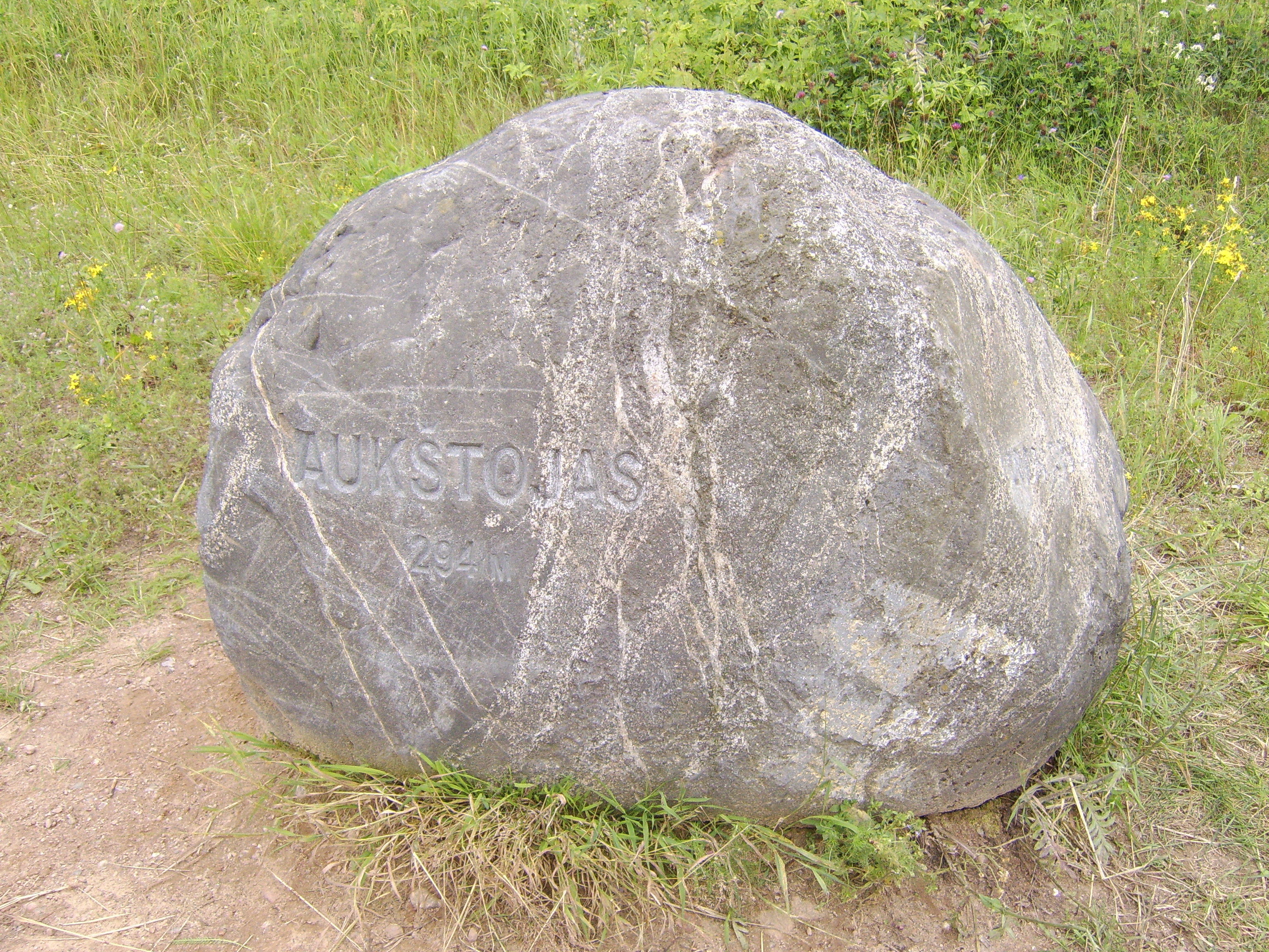 Komentaras Foto: Tomaš Staševskij